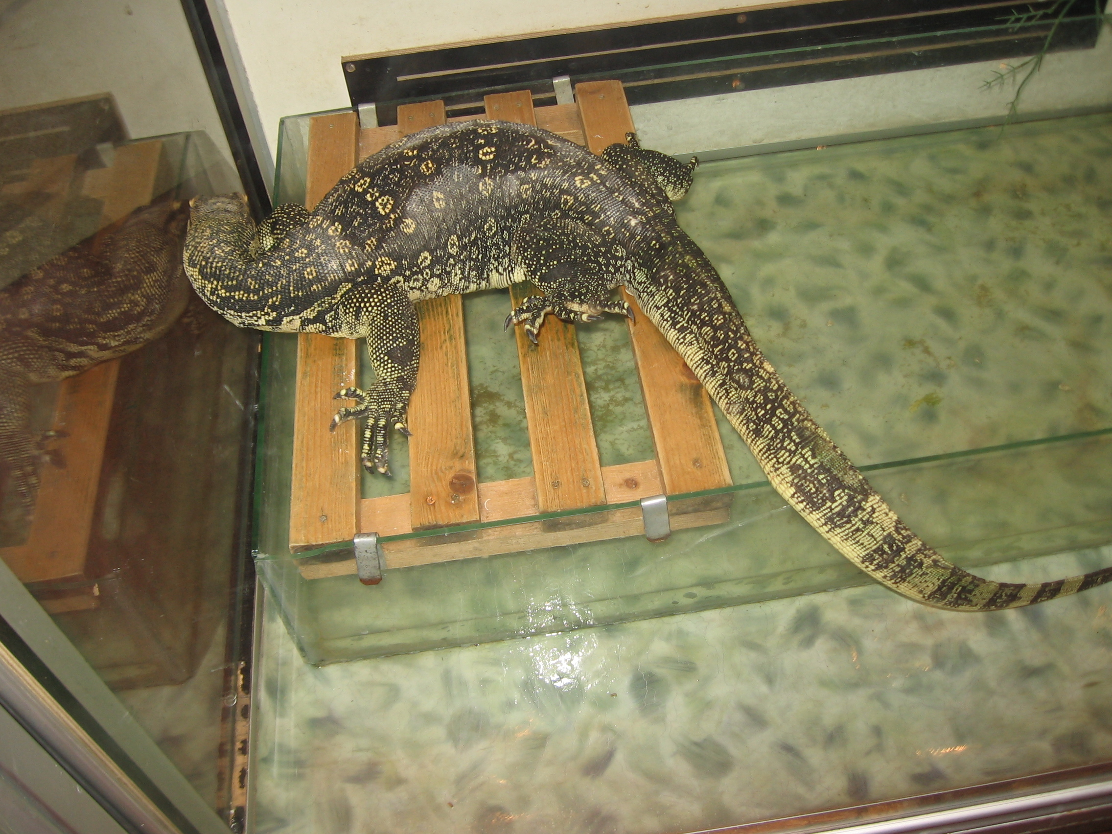 варан